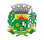 Brasão_Araputanga_MT.gif